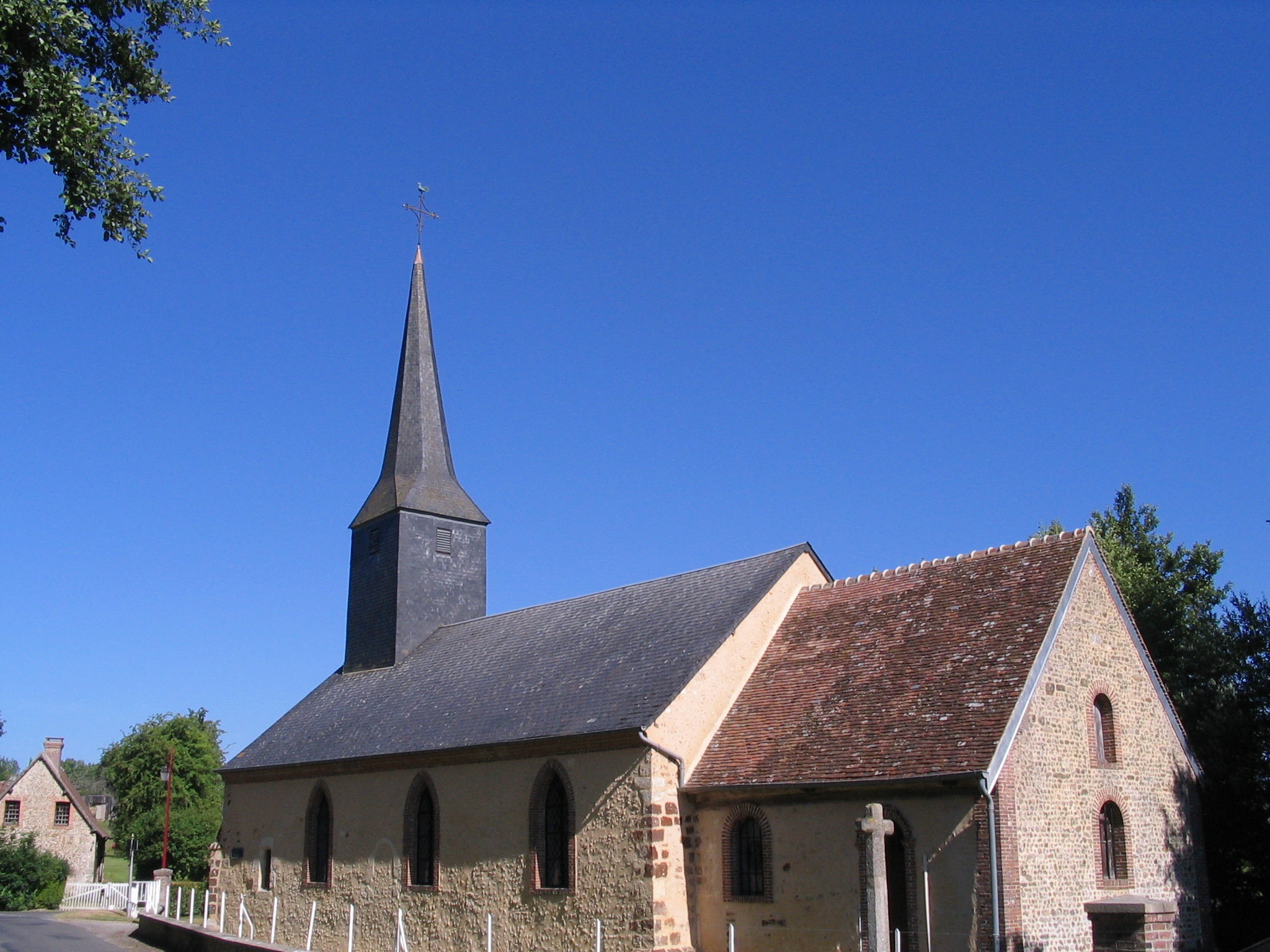 Eglise du Ménil-Bérard (Orne, France, Europe)